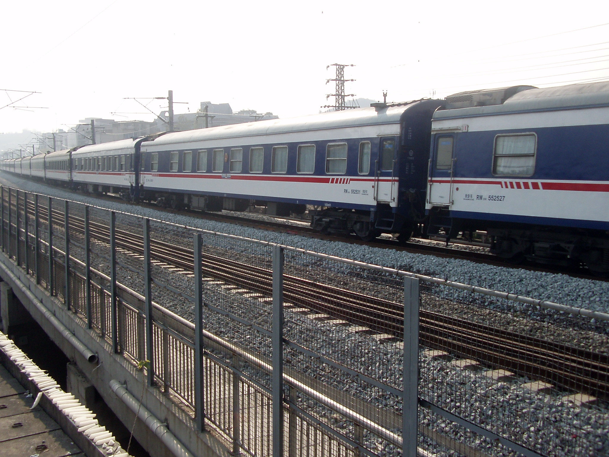 T6次列车上的国际列车车体